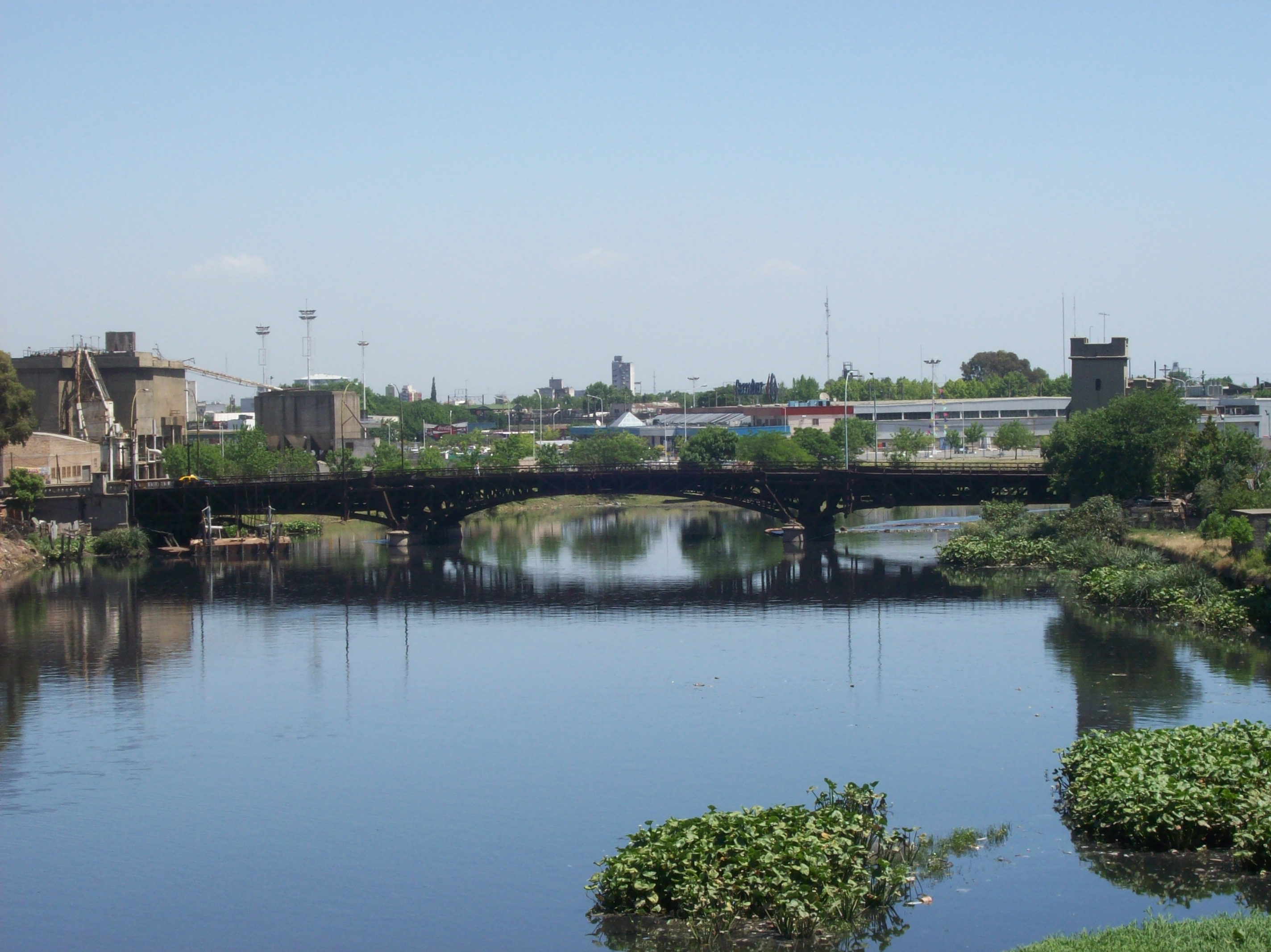 Viejo Puente Pueyrredón visto desde el Nuevo Puente Pueyrredón, sobre el Riachuelo, entre el barrio porteño de Barracas y la ciudad de Avellaneda.